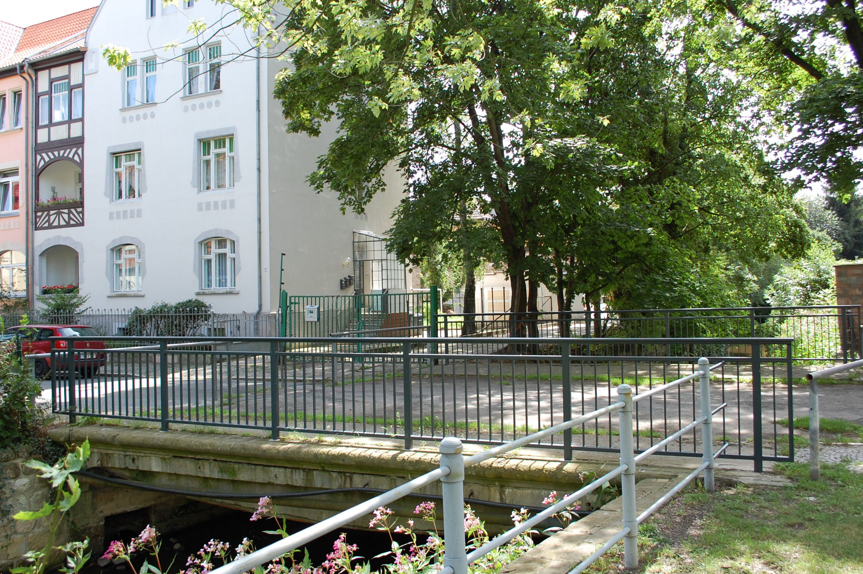 Brücke zwischen Julius-Wolff-Straße und Gröpern in Quedlinburg